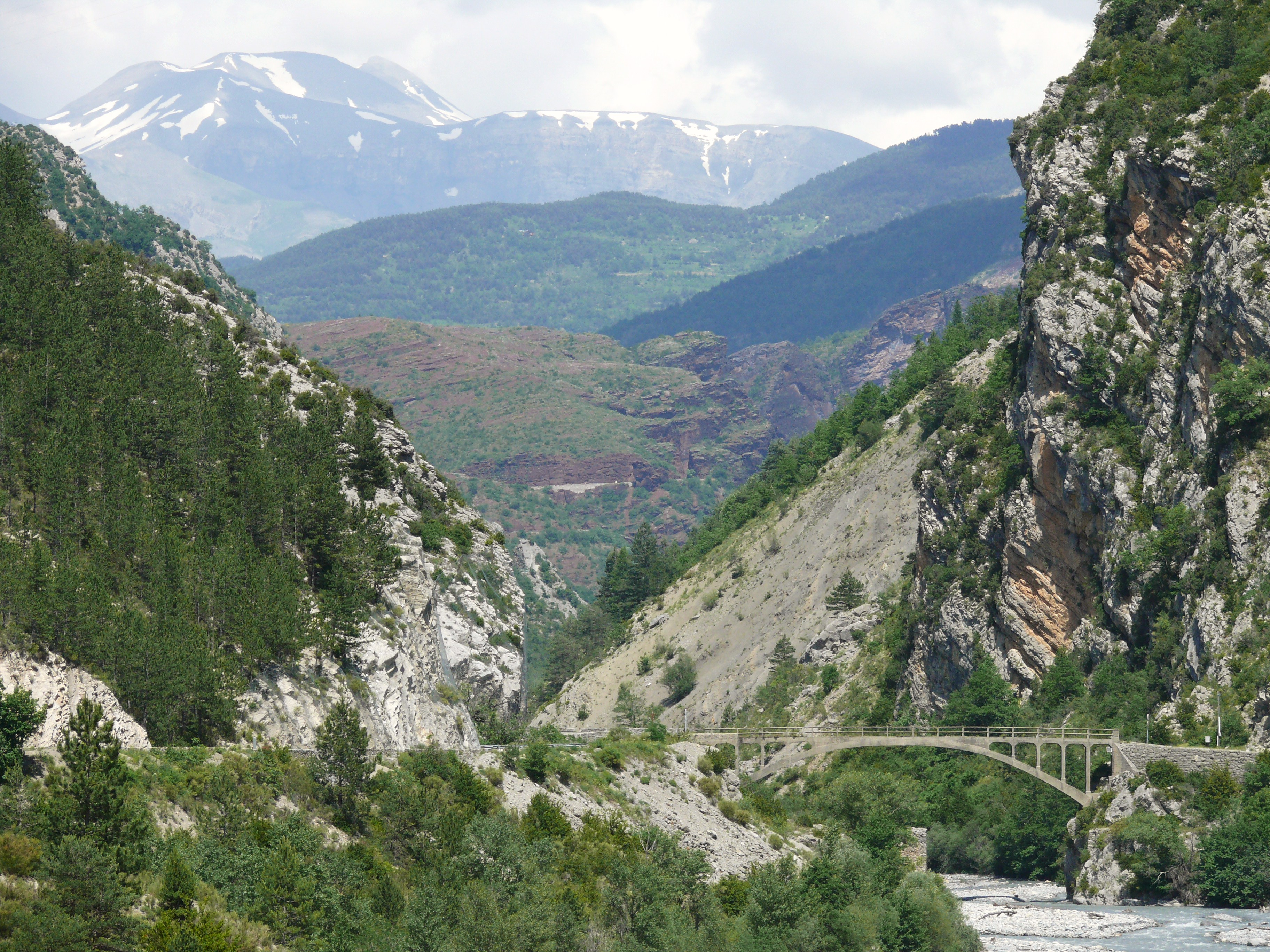 Daluis - Vallée du Var - Pont de la D316 vers la Vignasse et Saint-Léger. En arrière-plan les roches rouges du Dôme de Barrot, puis au fond le Mont-Mounier (2817 m) enneigé.